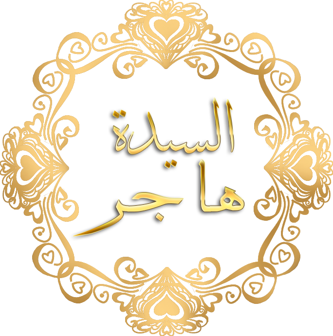 اسم السيدة هاجر بخط الثلث